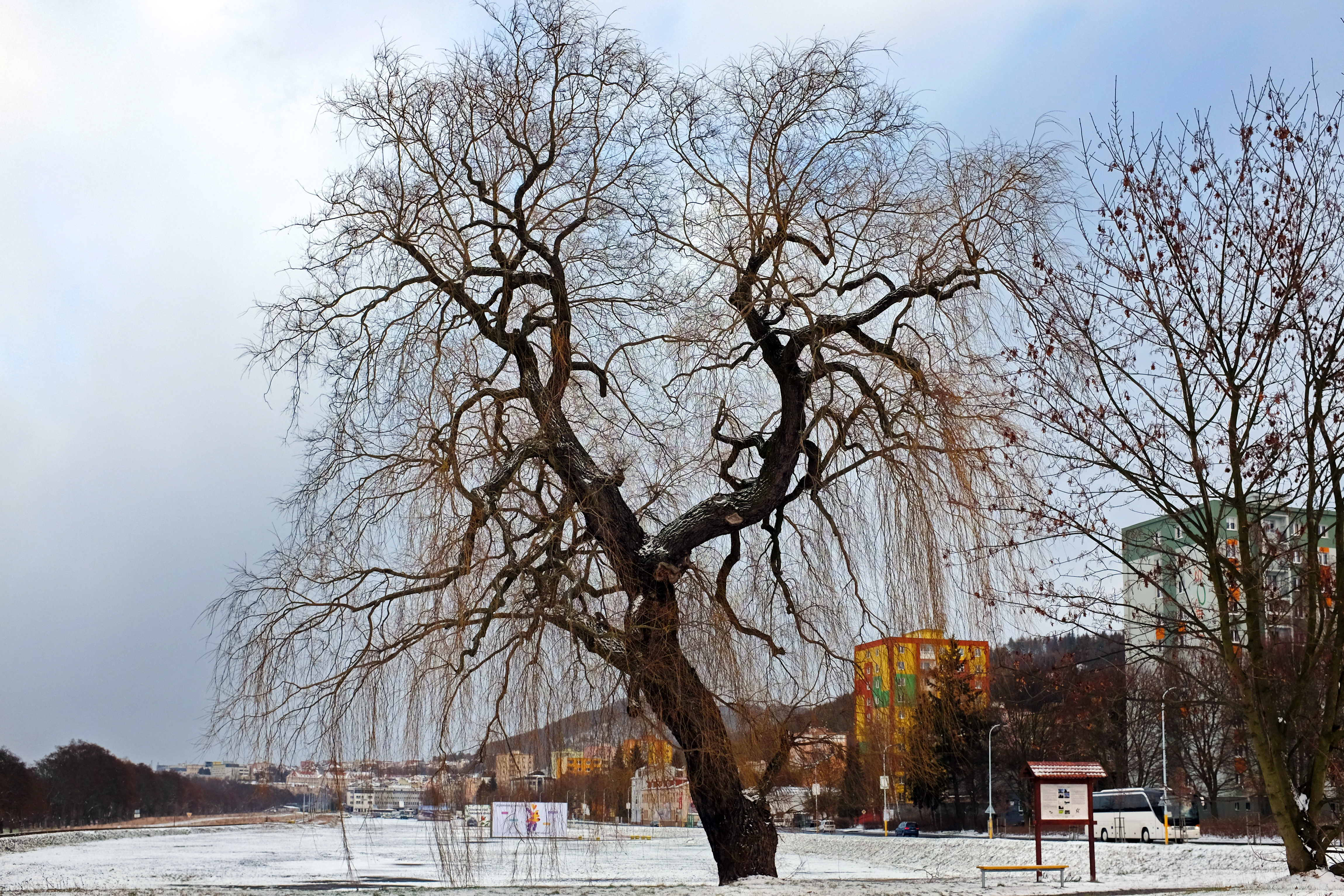 Strom hrdina - Tuhnická vrba - Karlovy Vary-Tuhnice